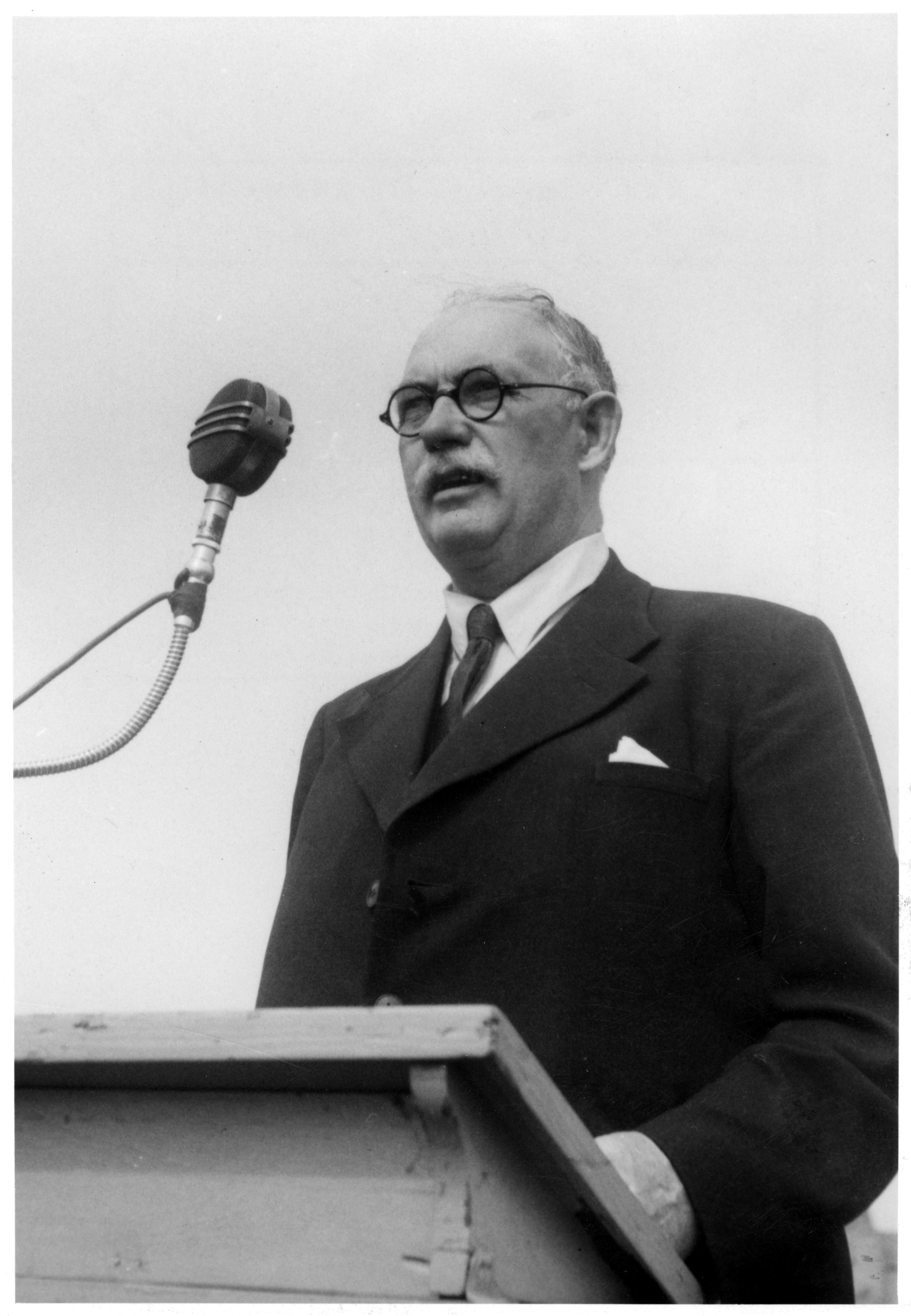 Axel Pehrsson-Bramstorp i Kalmar 1947